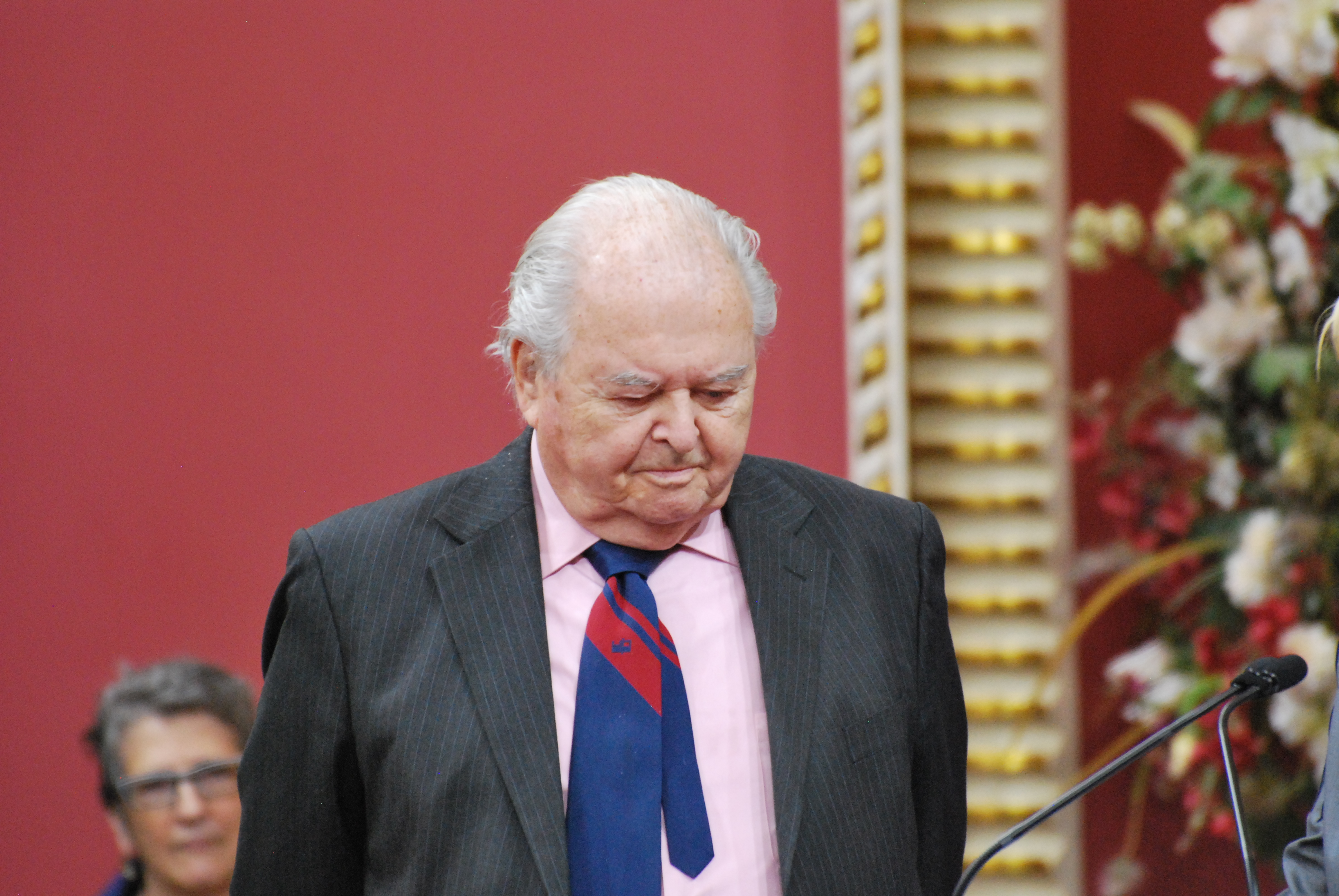 Cérémonie de remise de l'ordre national du Québec 2013.